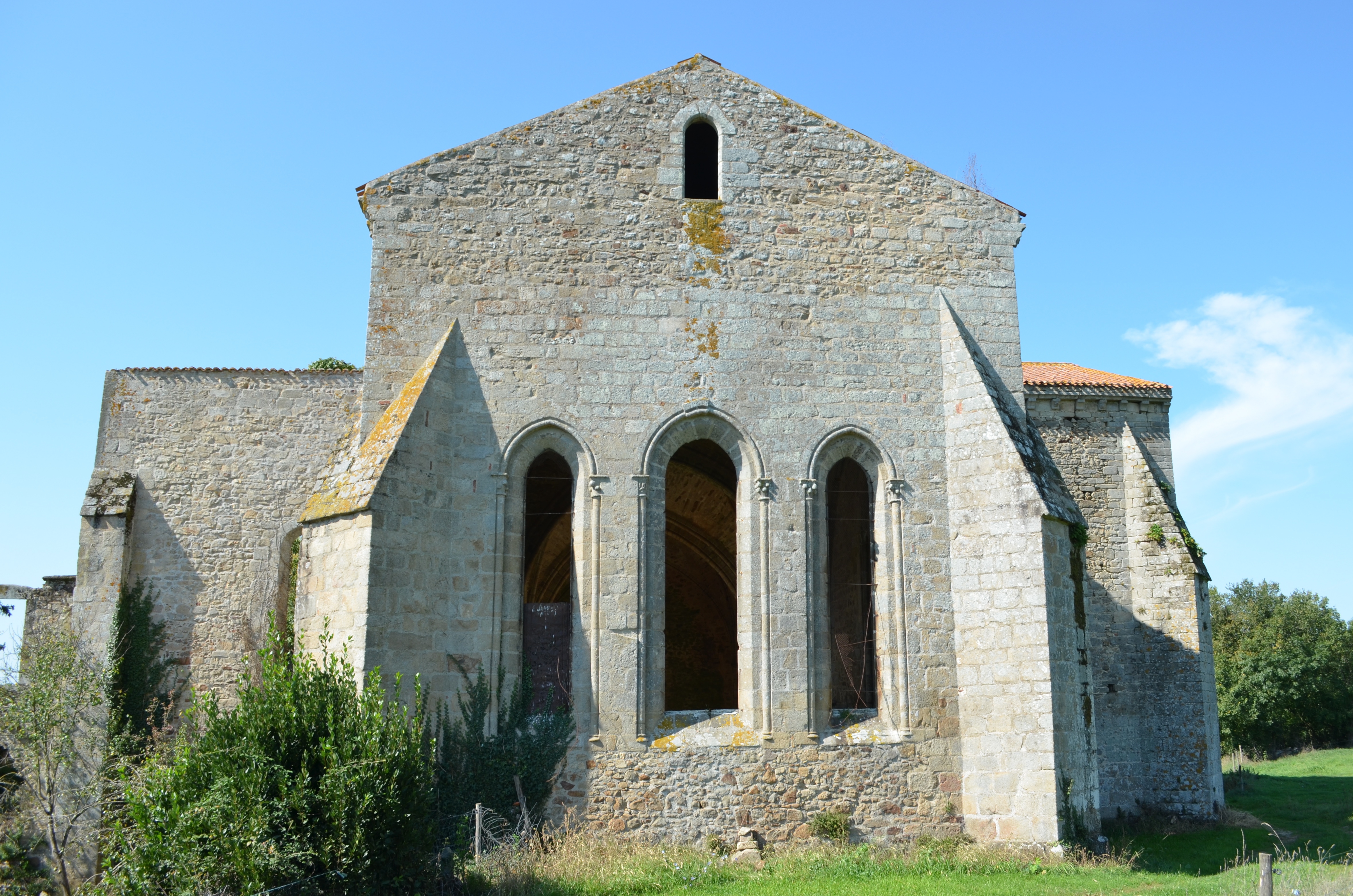 Ancienne abbaye des Fontenelles (13e s. ; 15e s.) - Saint André D'Ornay, La Roche-sur-Yon .